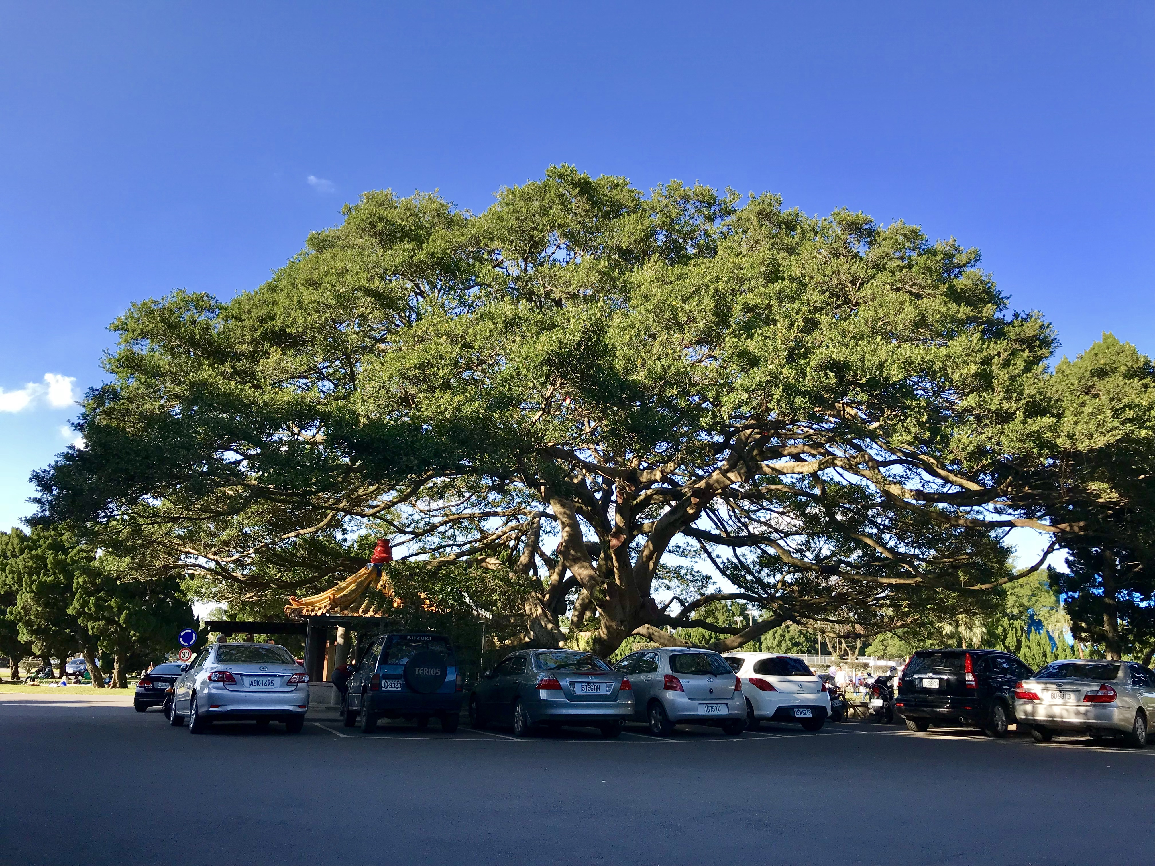 十一份集福宮側照與榕樹